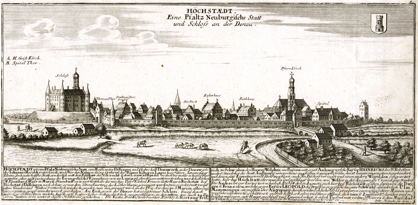 Höchstädt, Kupferstich von Daniel Bodenehr, um 1710.